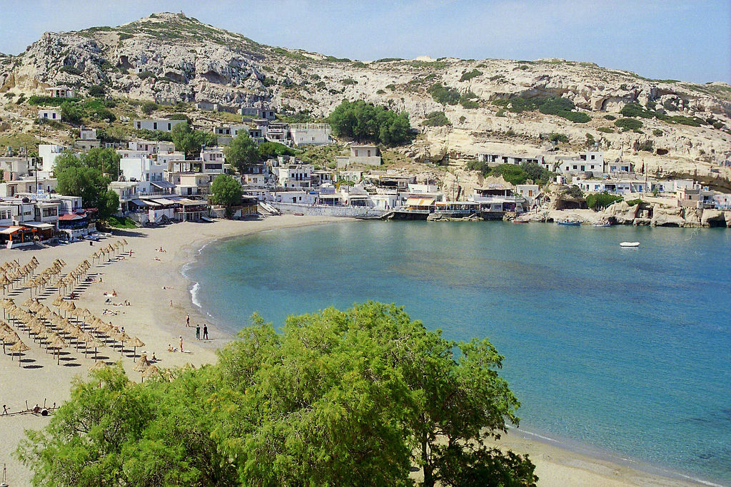 Matala, zatoka i plaża, lipiec 2003